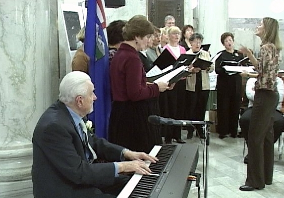 Jiří Traxler doprovází sbor při vystoupení v Edmontonu 10.března 2007 - u příležitosti 95.narozenin